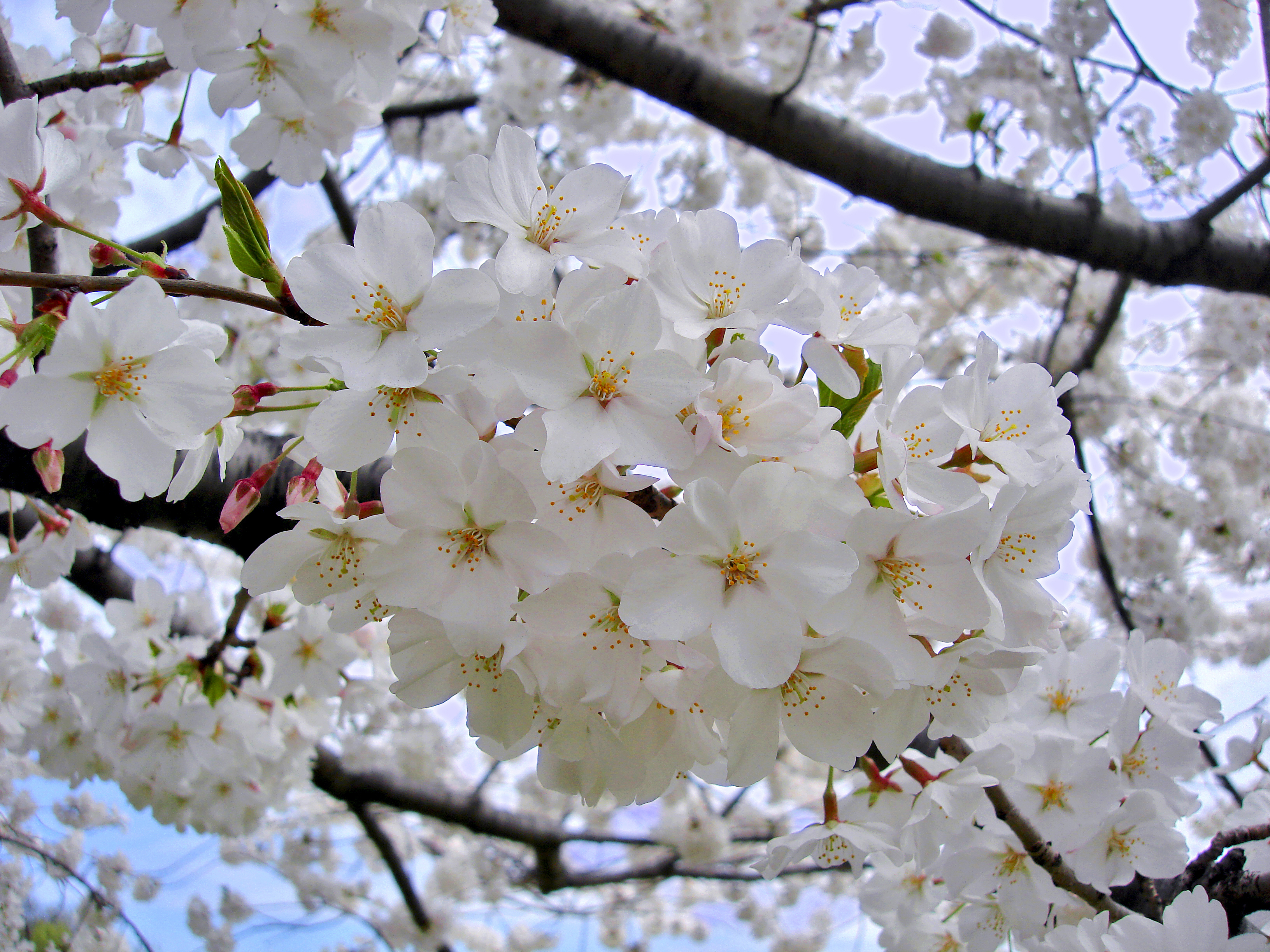 Sakura